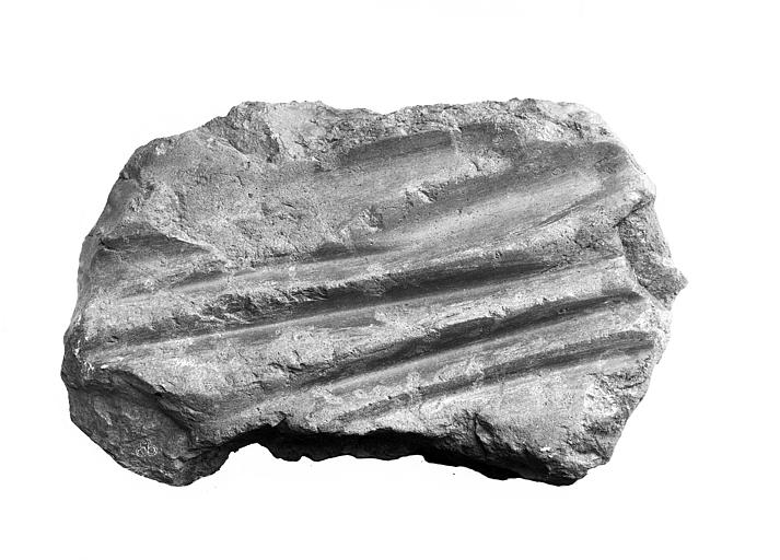 Polissoir de Ferrière-Larçon. Photographie de Séraphin-Médéric Mieusement.